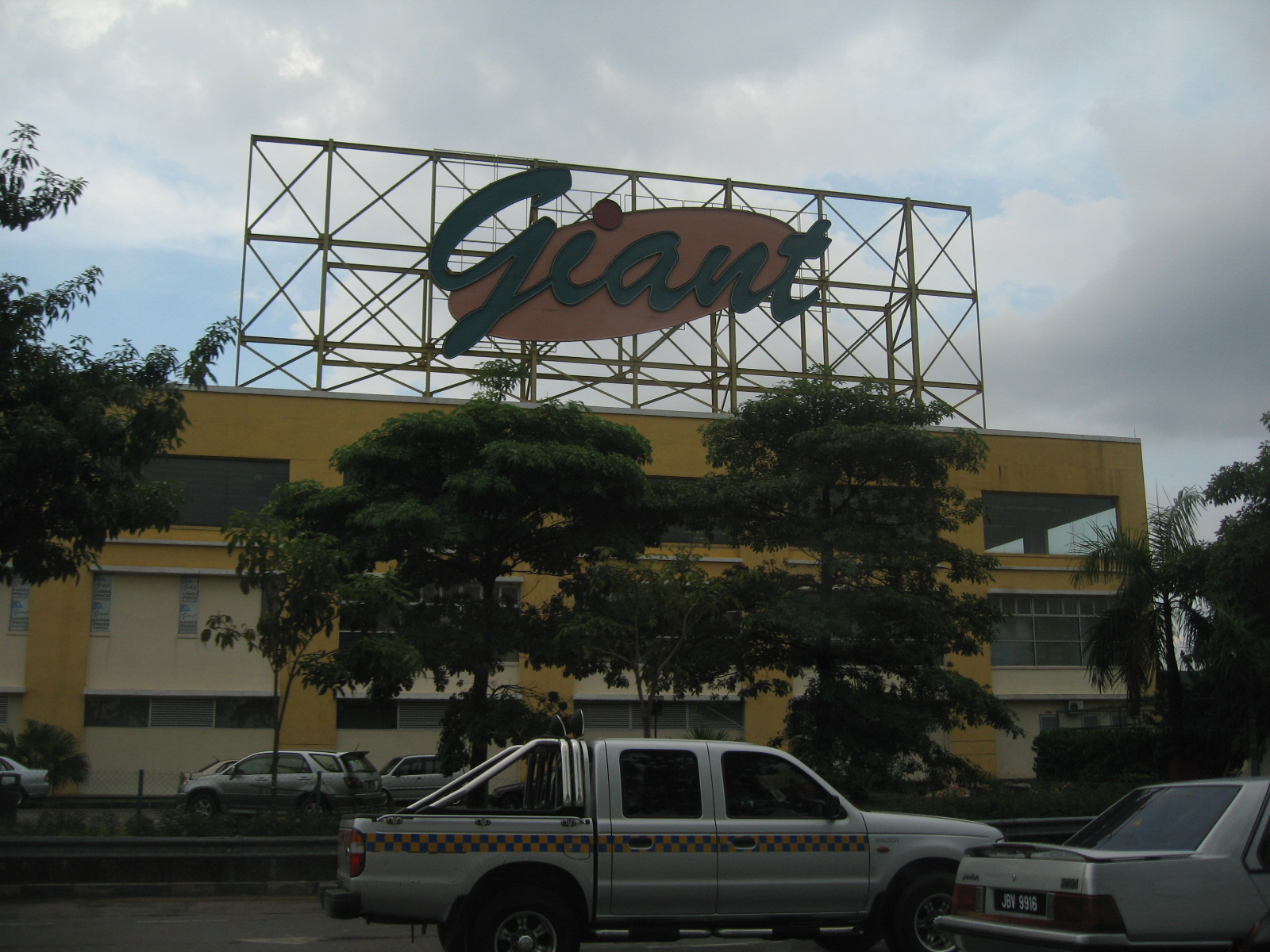 Giant Tampoi, Jalan Skudai, Johor Bahru, Malaysia.